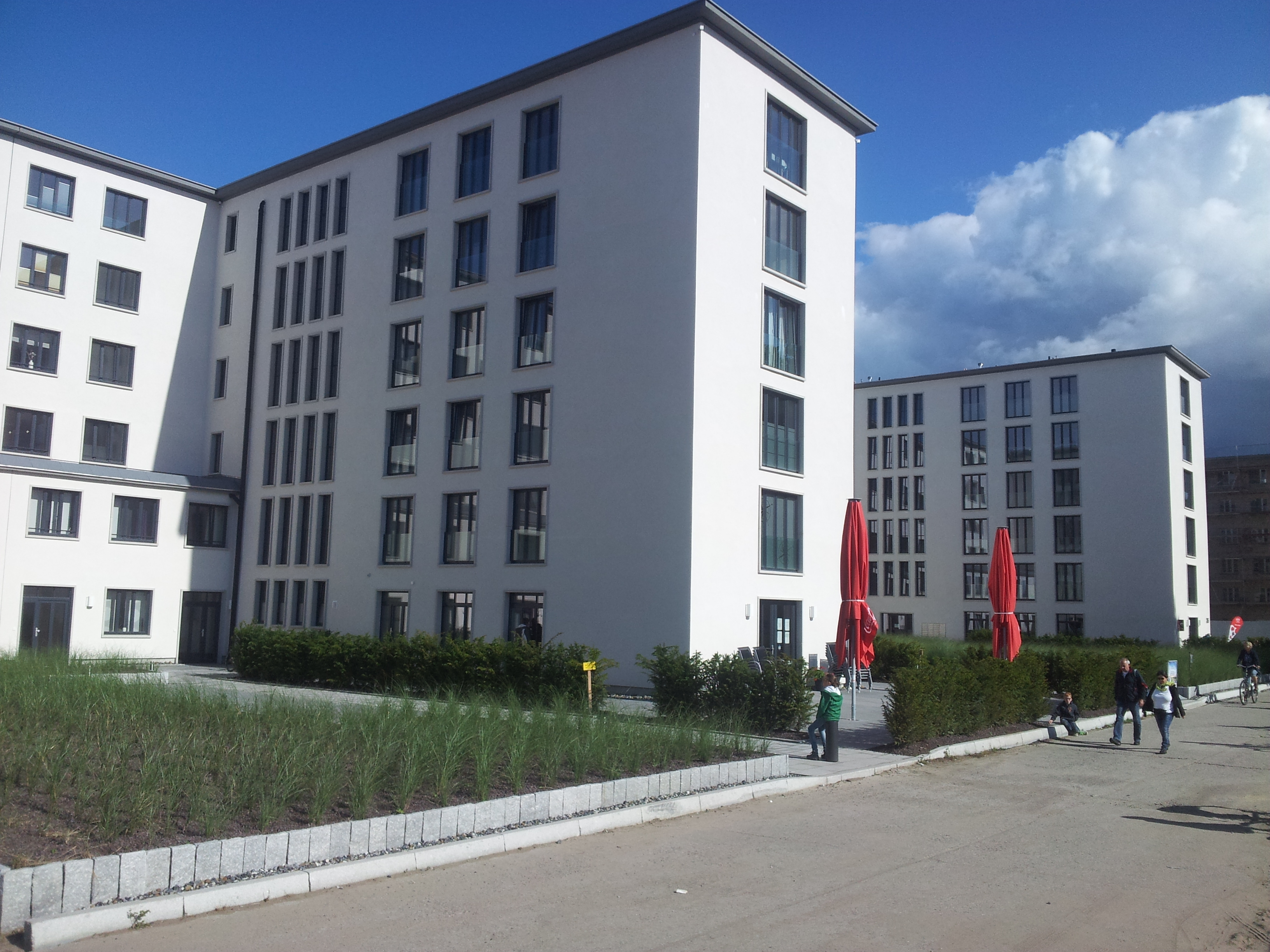 bereits sanierte Blöcke (Wohnungen) in Prora